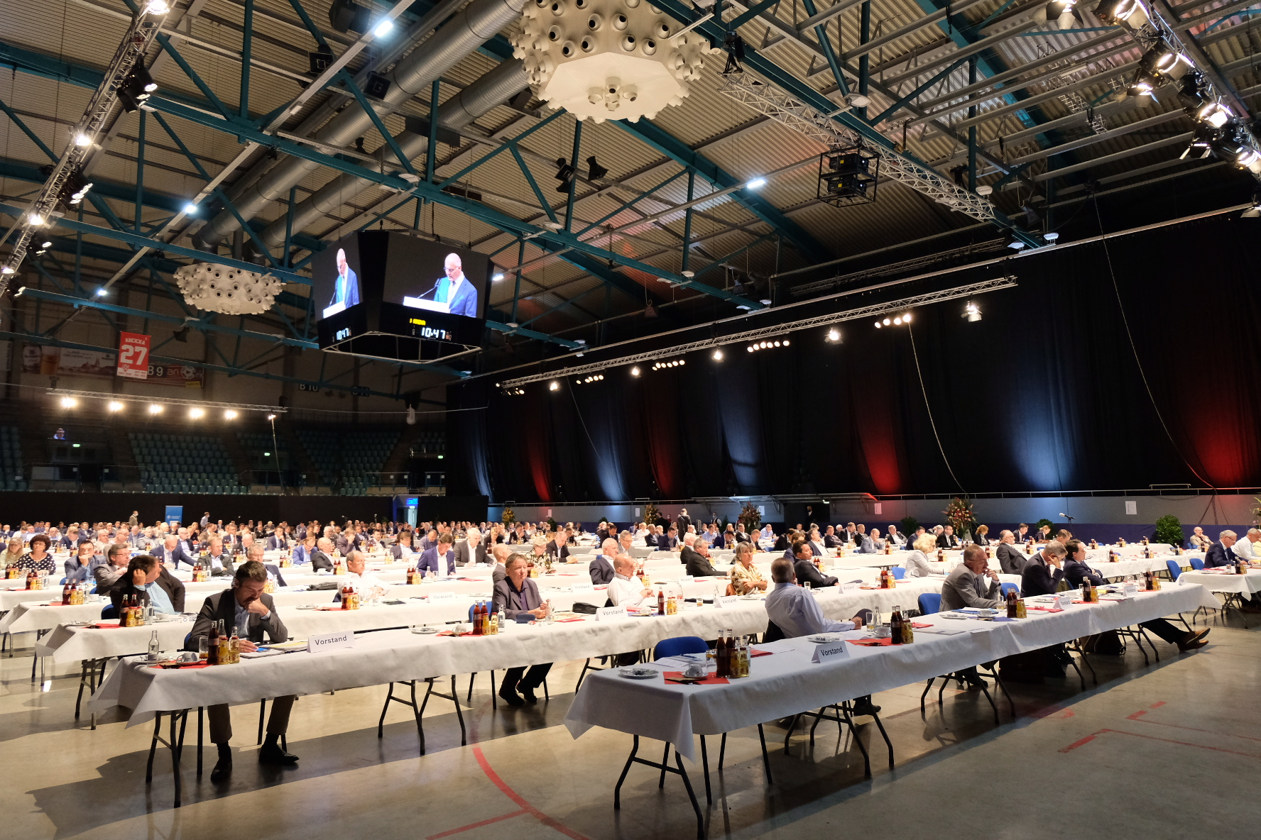 Vorstand und Delegierte des Bay. Städtetags bei der 56. Vollversammlung in Regensburg, Juli 2020